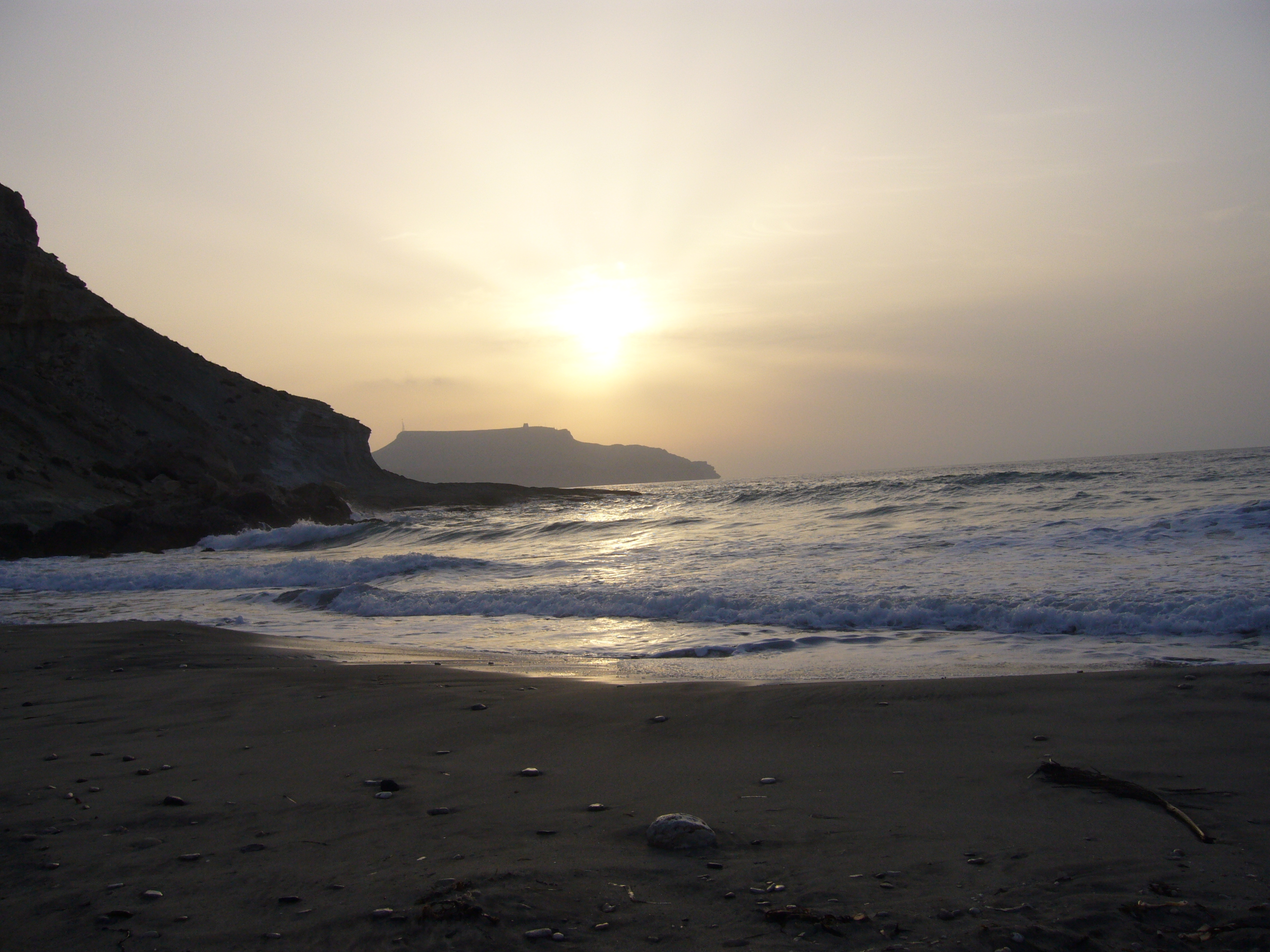 Amanecer en la cala del plomo